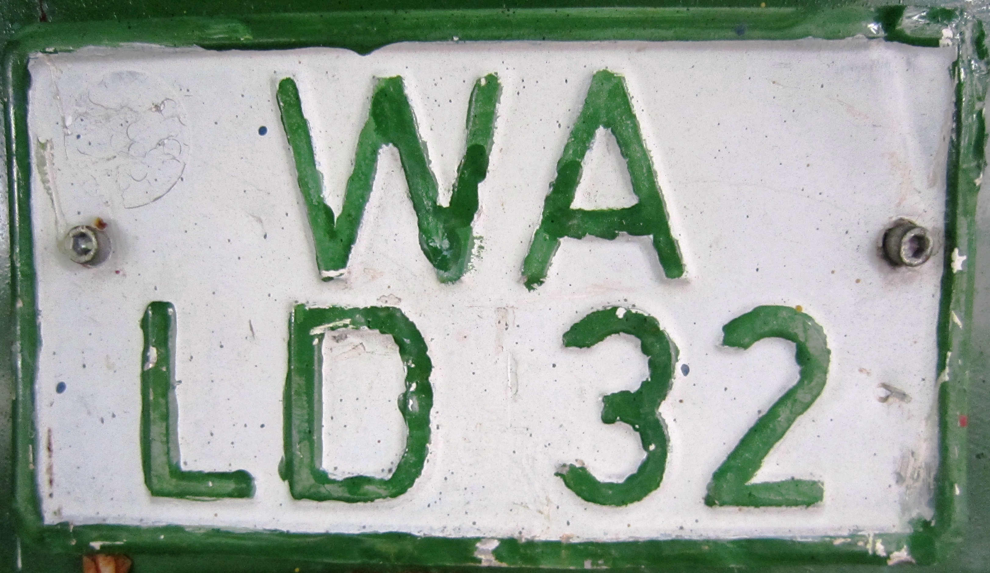 kentekenplaat van voormalige kreis Waldeck